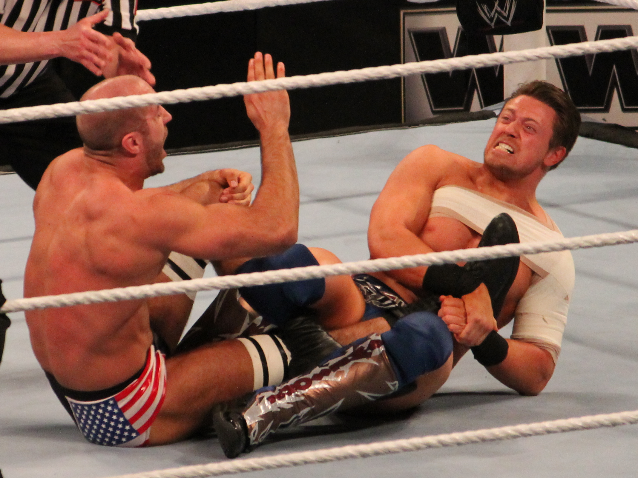 miz figure 4 leg lock